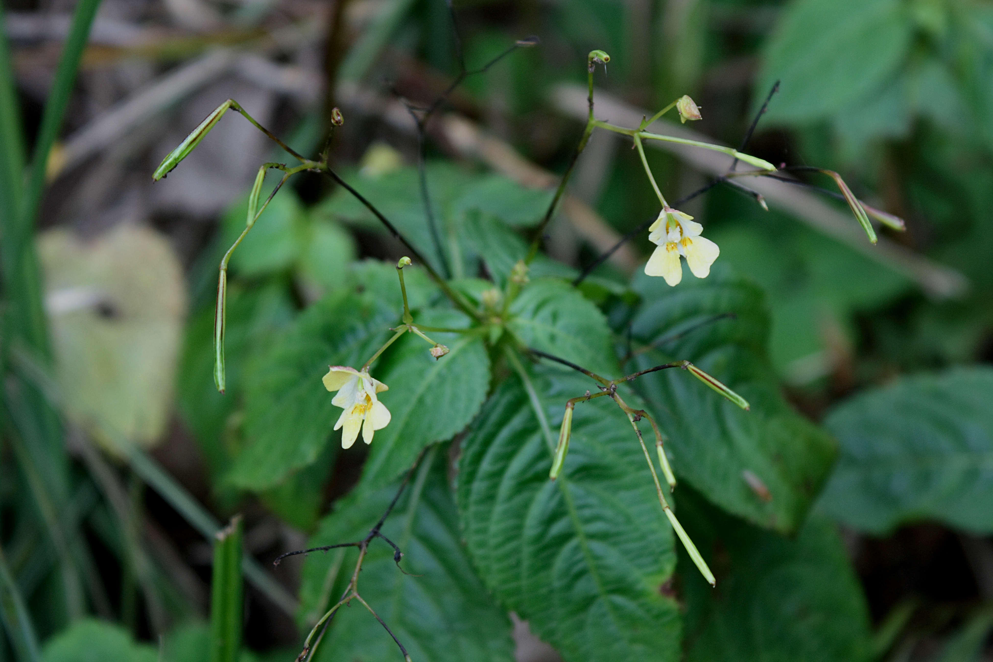 Netýkavka malokvětá která lemuje kus cesty směřující k Břevské nádži.